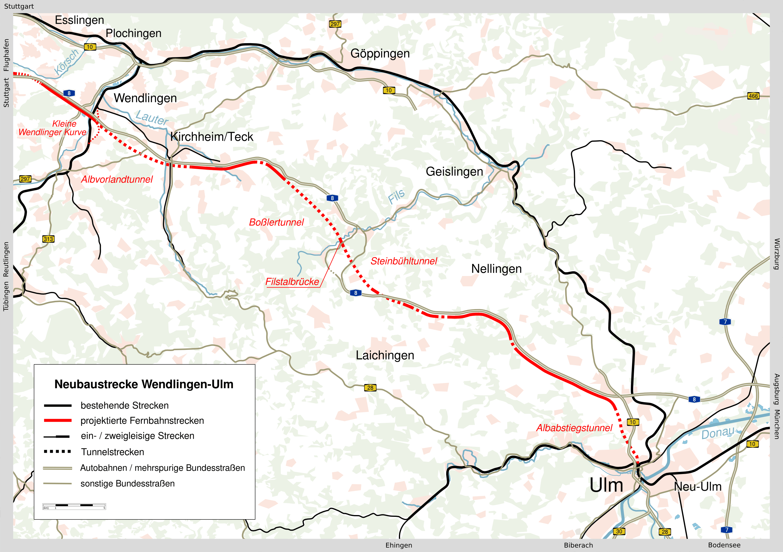 Grafische Übersicht zur Bahn-Neubaustrecke Wendlingen-Ulm. Diese Karte ist eine Erweiterung der Datei "Karte_Stuttgart_21_aussen_Kartenwerkstatt.svg" von K. Jähne (Lizenz: Public Domain), die die Umgestaltung des Bahnknotens um Stuttgart "Stuttgart 21" zum Thema hat. Außerhalb des sichtbaren Bereichs enthält die Datei "Neubaustrecke_Wendlingen_Ulm.svg" immer noch die Karte zu Stuttgart 21. Die Karte basiert auf OSM-Daten und Angaben der Planfeststellungsabschnitte 2.1 bis 2.3.